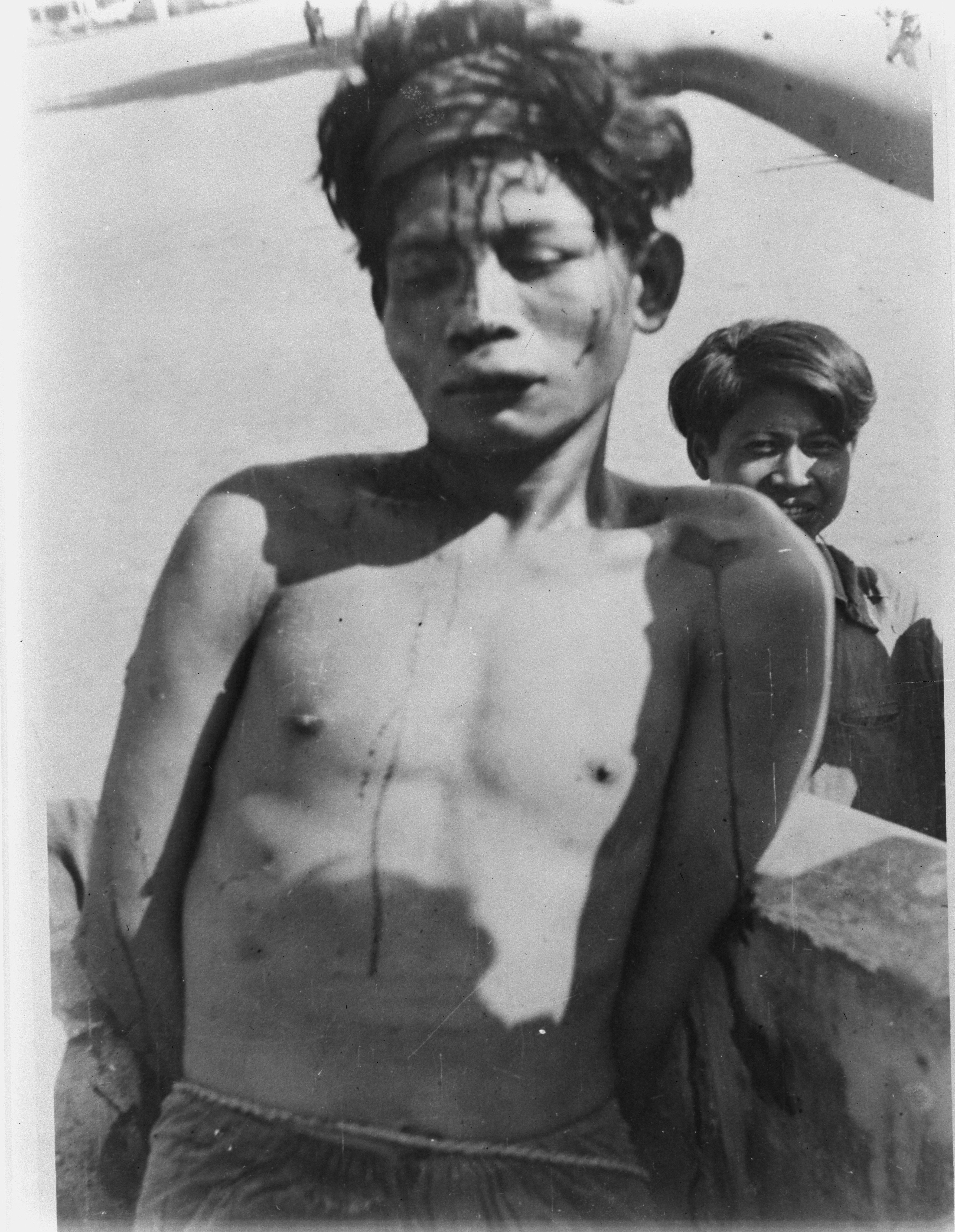 Collectie / Archief : Fotocollectie Dienst voor Legercontacten Indonesië Reportage / Serie : [DLC] Foto's gedode communisten door de TNI [gemaakt te Madioen, september 1948] Beschrijving : Een toegetakelde man wordt getoond aan publiek, staand op het bouwwerk met trap Datum : september 1948 Locatie : Indonesië, Madiun, Nederlands-Indië Fotograaf : Fotograaf Onbekend / DLC Auteursrechthebbende : Nationaal Archief Materiaalsoort : Negatief (zwart/wit) Nummer archiefinventaris : bekijk toegang 2.24.04.02 Bestanddeelnummer : 8826